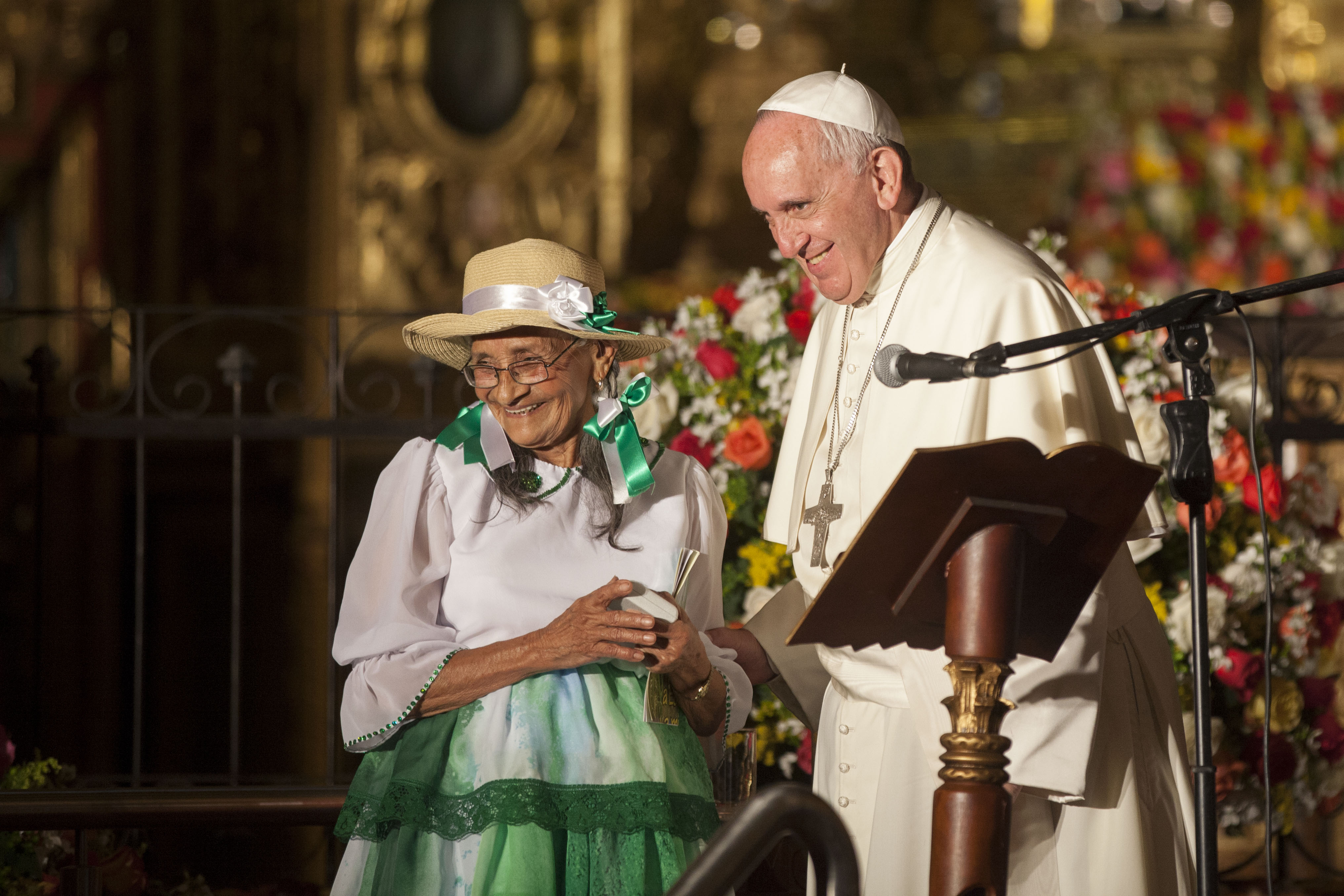 Quito, Ecuador. 07 de julio de 2015. El Santo Padre Papa Francisco, recibe a personalidades de diferentes partes del Ecuador en la Iglesia de San Francisco. Carlos Pozo / Cancillería Ecuador